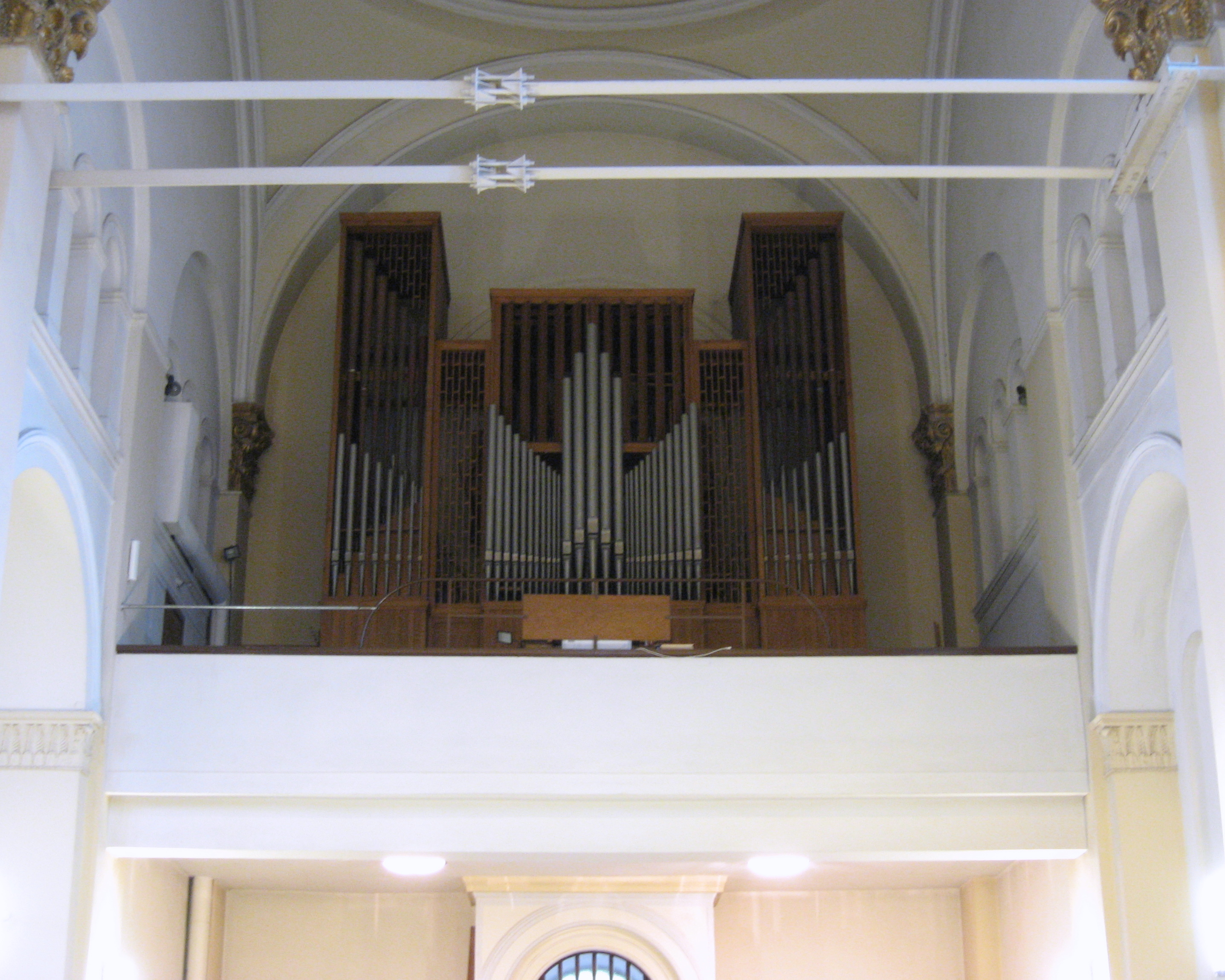 Orgel von Sankt Michael in Berlin